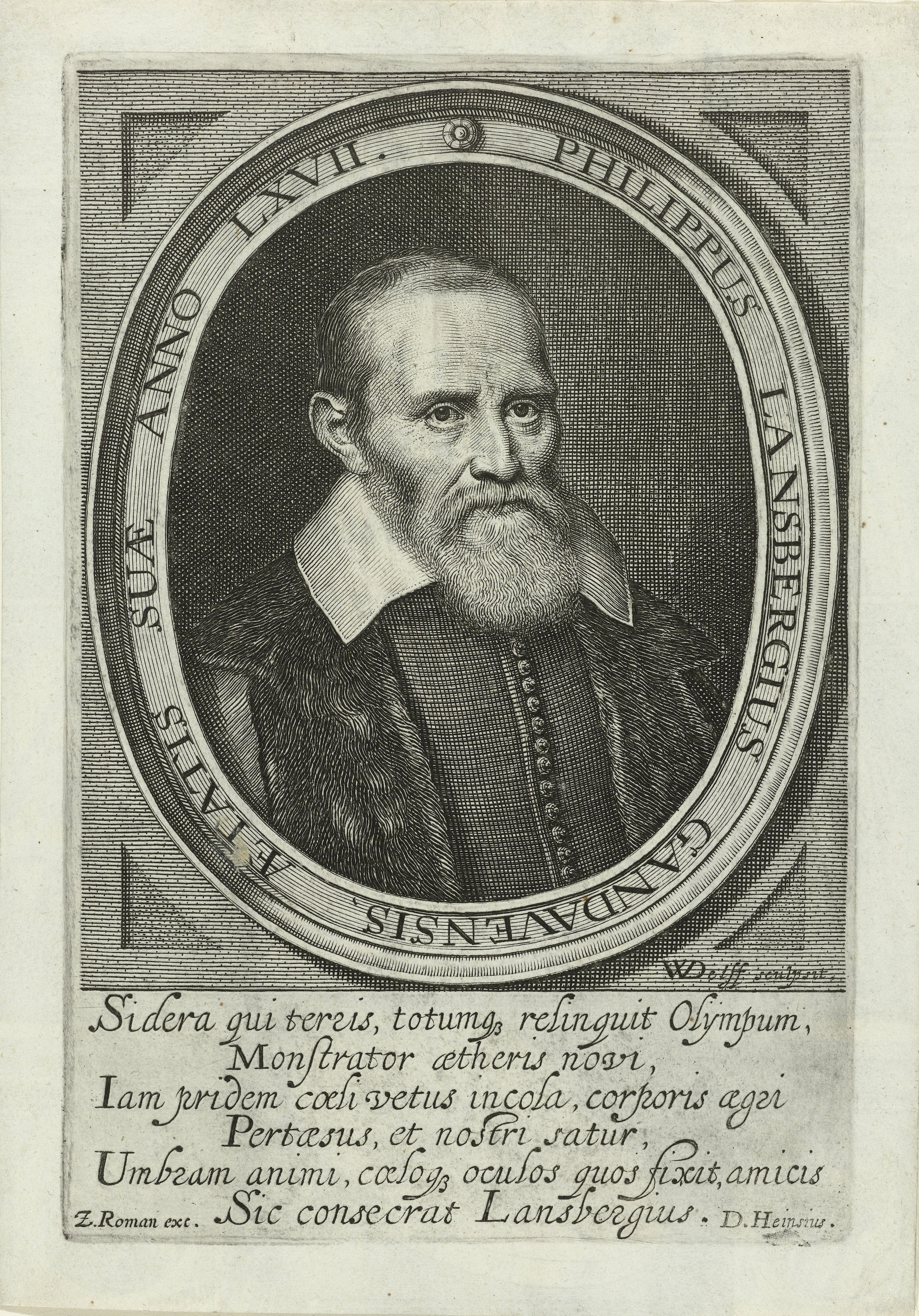 IdentificatieTitel(s): Portret van Johan Philip Lansberge op 67-jarige leeftijdObjecttype: prent boekillustratie Objectnummer: RP-P-1906-875Catalogusreferentie: Hollstein Dutch 38-2(2)Opmerking: 2(3)Opschriften / Merken: verzamelaarsmerk, verso, gestempeld: Lugt 2228Omschrijving: Portret van schrijver en astronoom Johan Philip Lansberge op 67-jarige leeftijd, borststuk gekleed in toga in ovale omlijsting. Latijns vers van zes regels in ondermarge. Op verso fragment van titelpagina van uitgave over Lansberge met sterrenkundigen.VervaardigingVervaardiger: prentmaker: Willem Jacobsz. Delff (vermeld op object)uitgever: Zacharias Roman (vermeld op object)schrijver: Daniël Heinsius (vermeld op object)Plaats vervaardiging: prentmaker: Delftuitgever: MiddelburgDatering: 1628 - 1638 en/of 1663Fysieke kenmerken: gravureMateriaal: papier Techniek: graveren (drukprocedé)Afmetingen: plaatrand: h 191 mm × b 127 mmToelichtingPrent uit: Philippi Lansbergii, astronomi celeberrimi, opera omnia, Middelburg, Zacharias Roman (uitgever), 1663, zie titel op verso. Deze titel wijkt af van de Nederlandse titel genoemd in Hollstein, het betreft een vroegere uitgave dan de beschreven staat uit 1666.OnderwerpWat: portrait of a writerWie: Johan Philip LansbergeVerwerving en rechtenVerwerving: aankoop 1906Copyright: Publiek domein